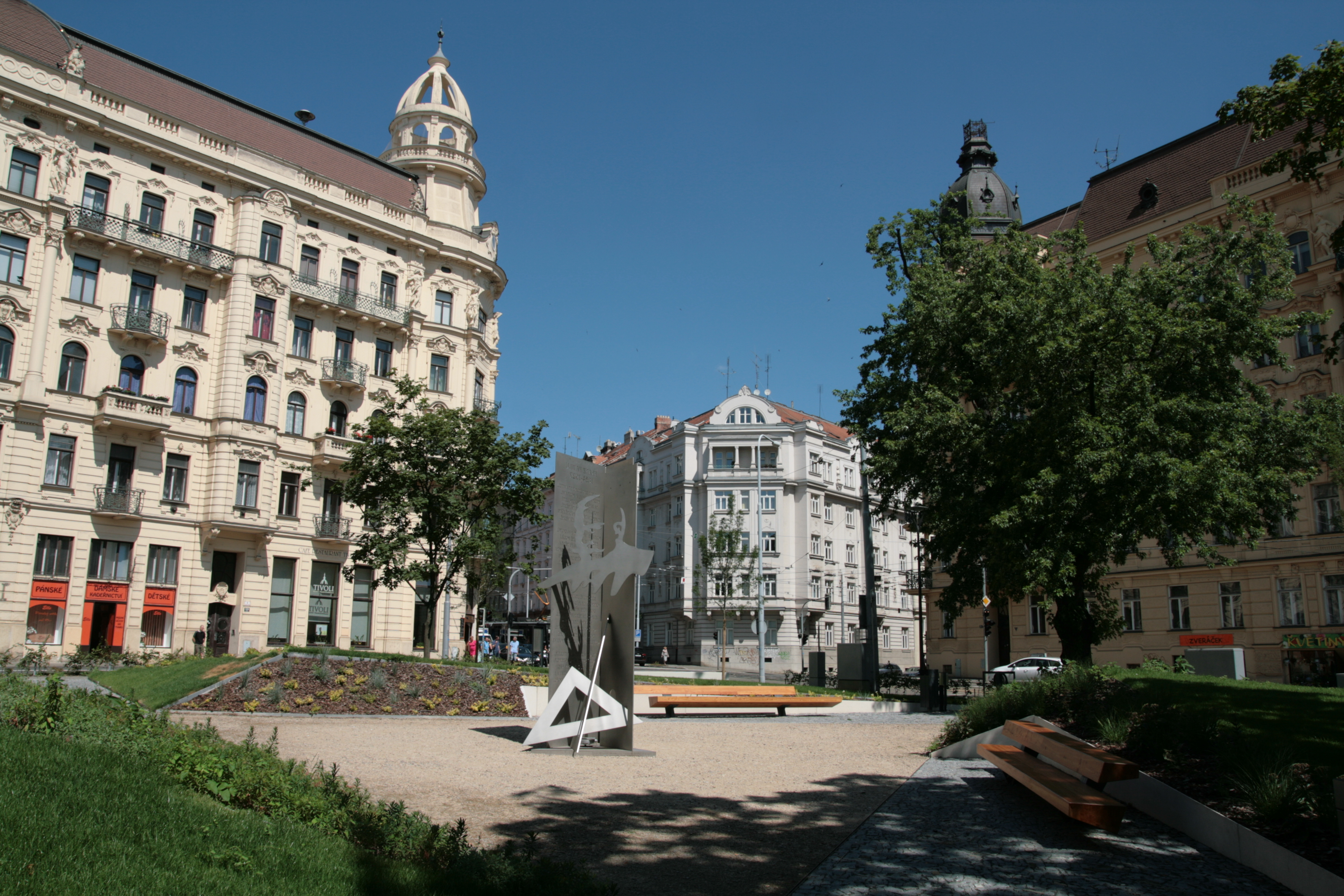 Konečného náměstí v Brně. Centrální park s památníkem architektovi Franzi Pawlu.